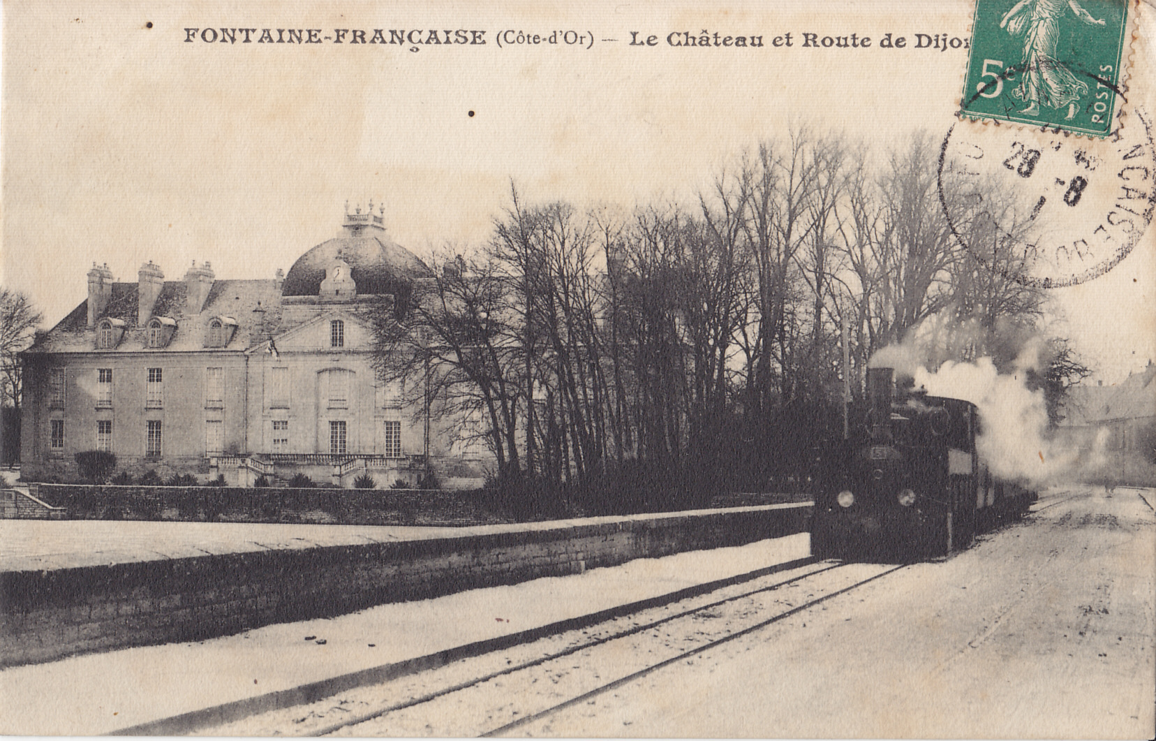 Carte postale ancienne sans mention d'éditeur